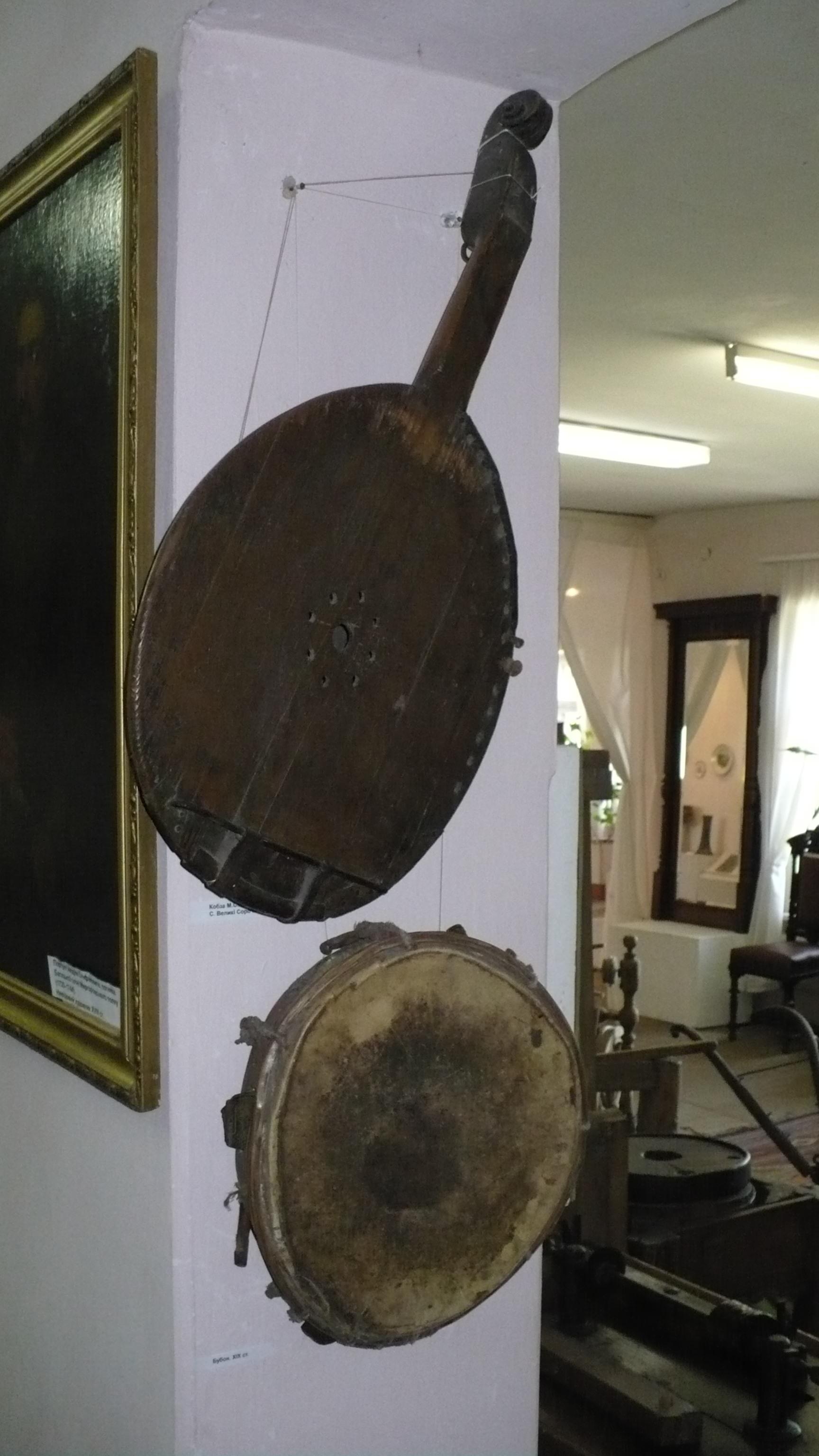 Миргородський Краєзнавчий музей (усередині 16). Внутрішній вигляд Миргородського Краєзнавчого музею